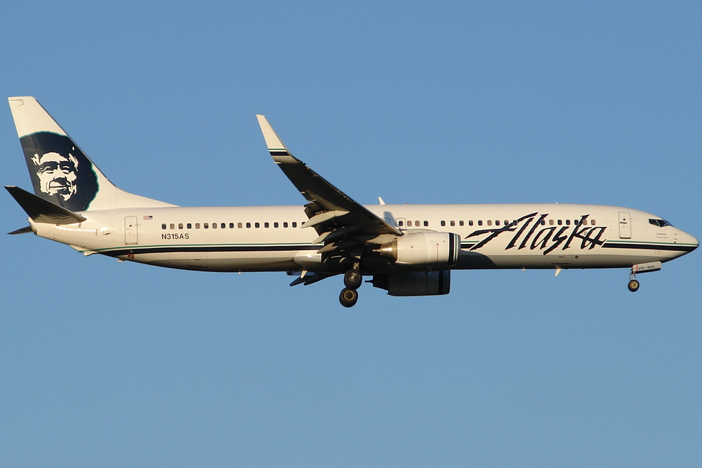 Alaska Airlines Boeing 737-900 [N315AS]